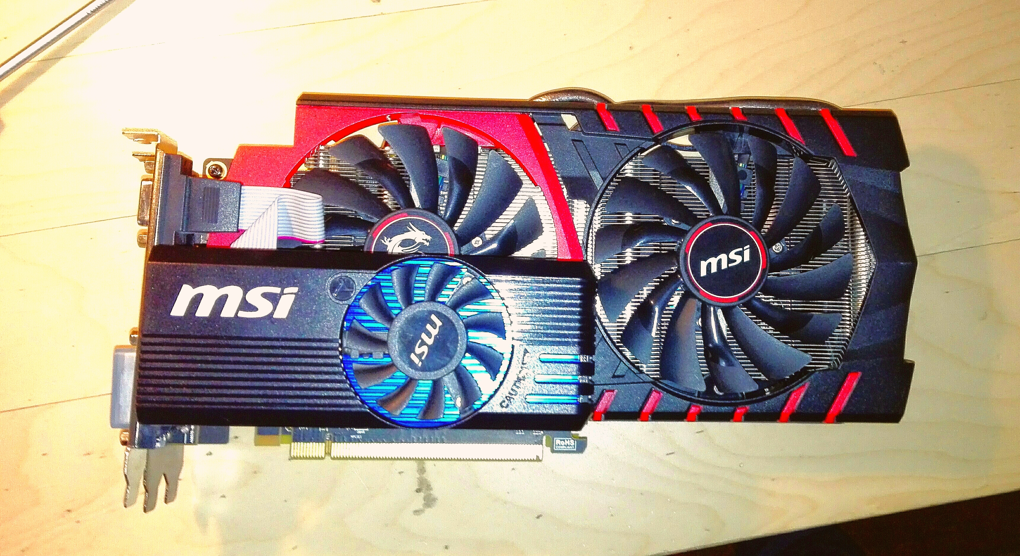 Mała karta to Radeon R7 200, natomiast duża to GeForce GTX 970.